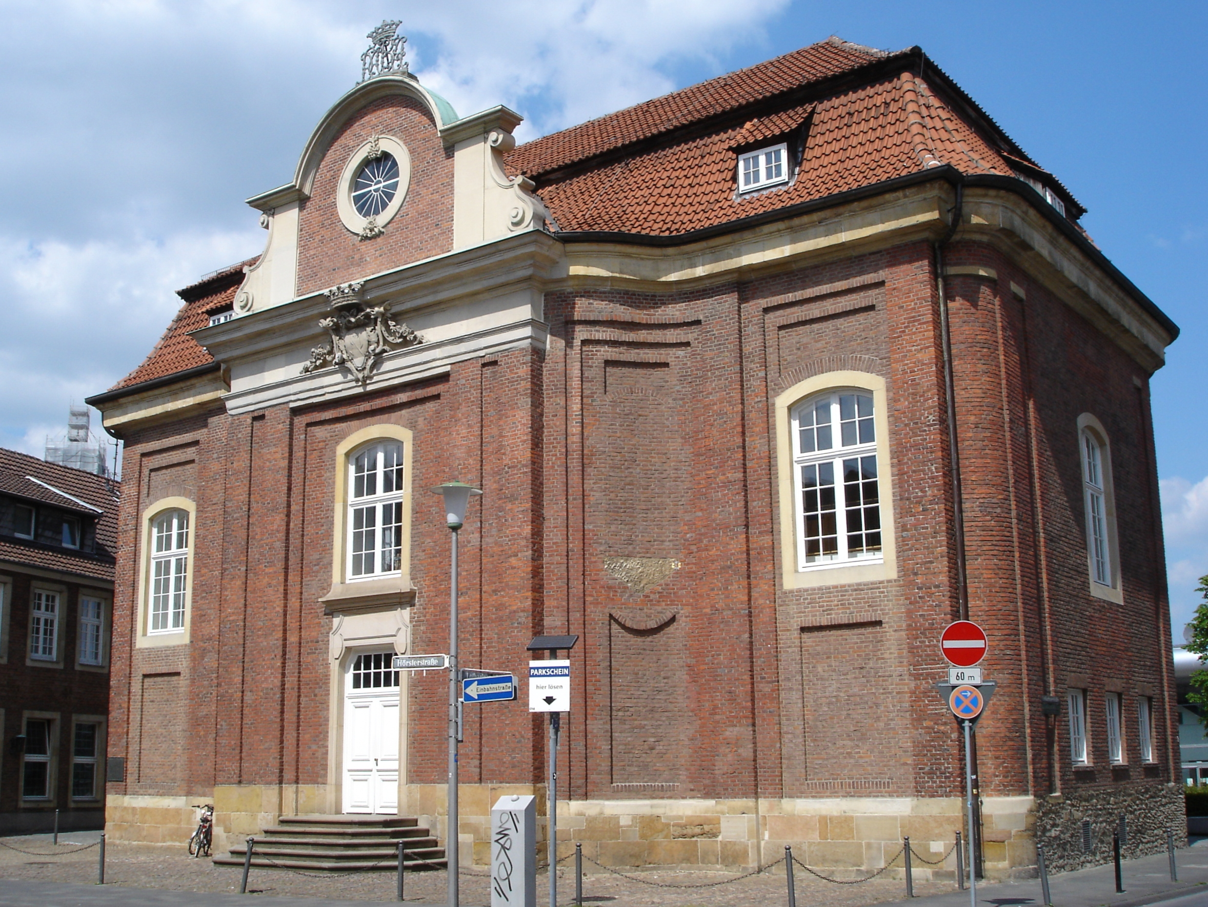 Die ehemalige Lotharinger Chorfrauenkirche in Münster, Westfalen, Deutschland